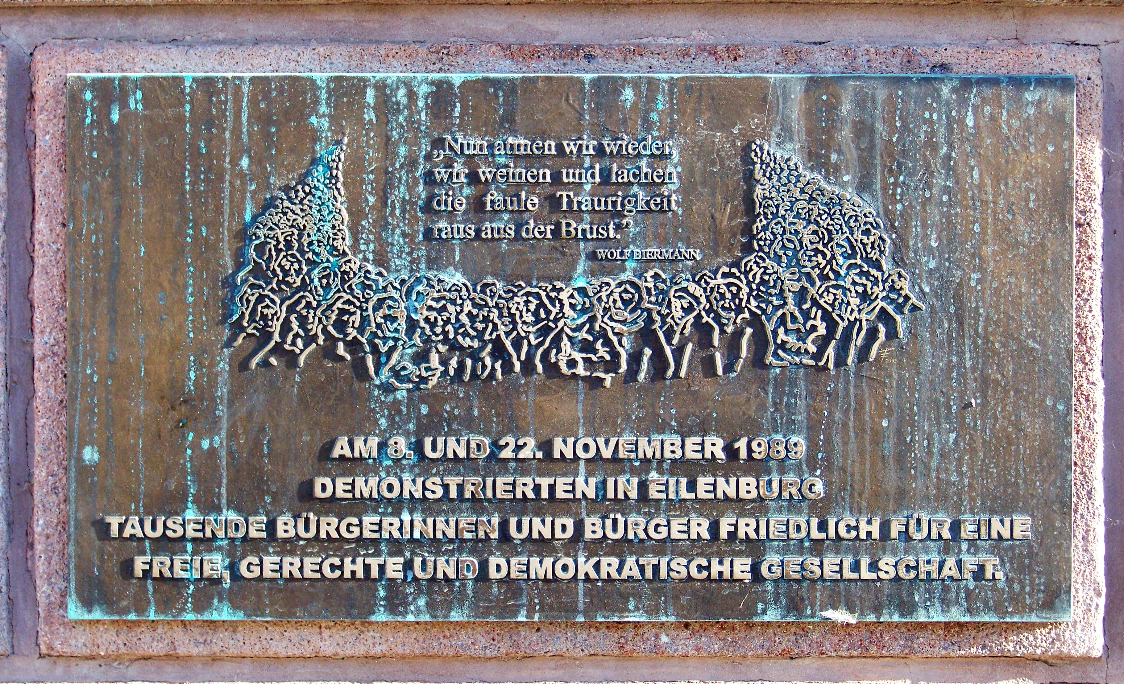 Gedenktafel am Rathaus Eilenburg zur Erinnerung an die Demonstrationen der Eilenburger in der Friedlichen Revolution in der DDR im Herbst 1989